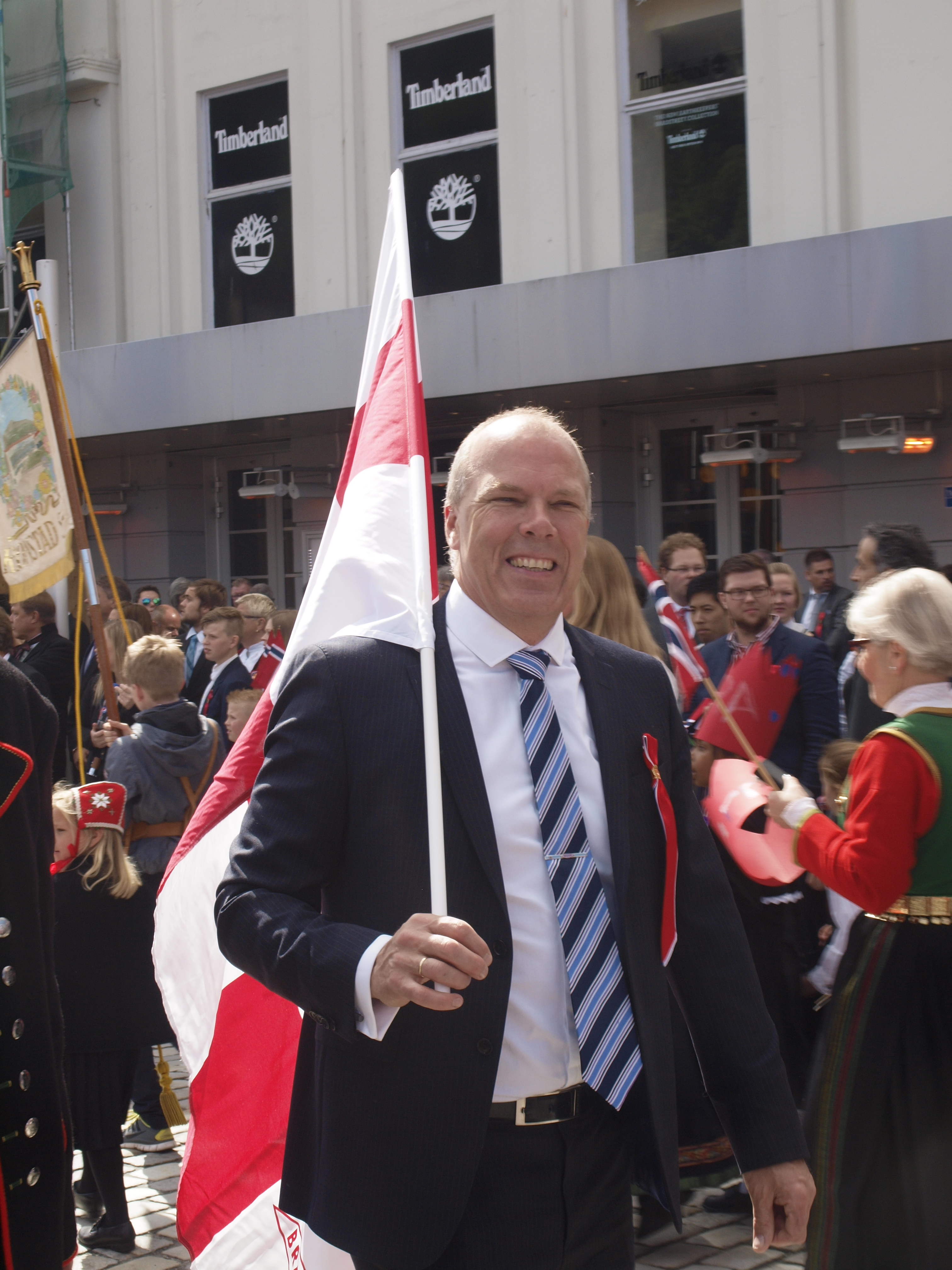 Roald Bruun Hansen 2014